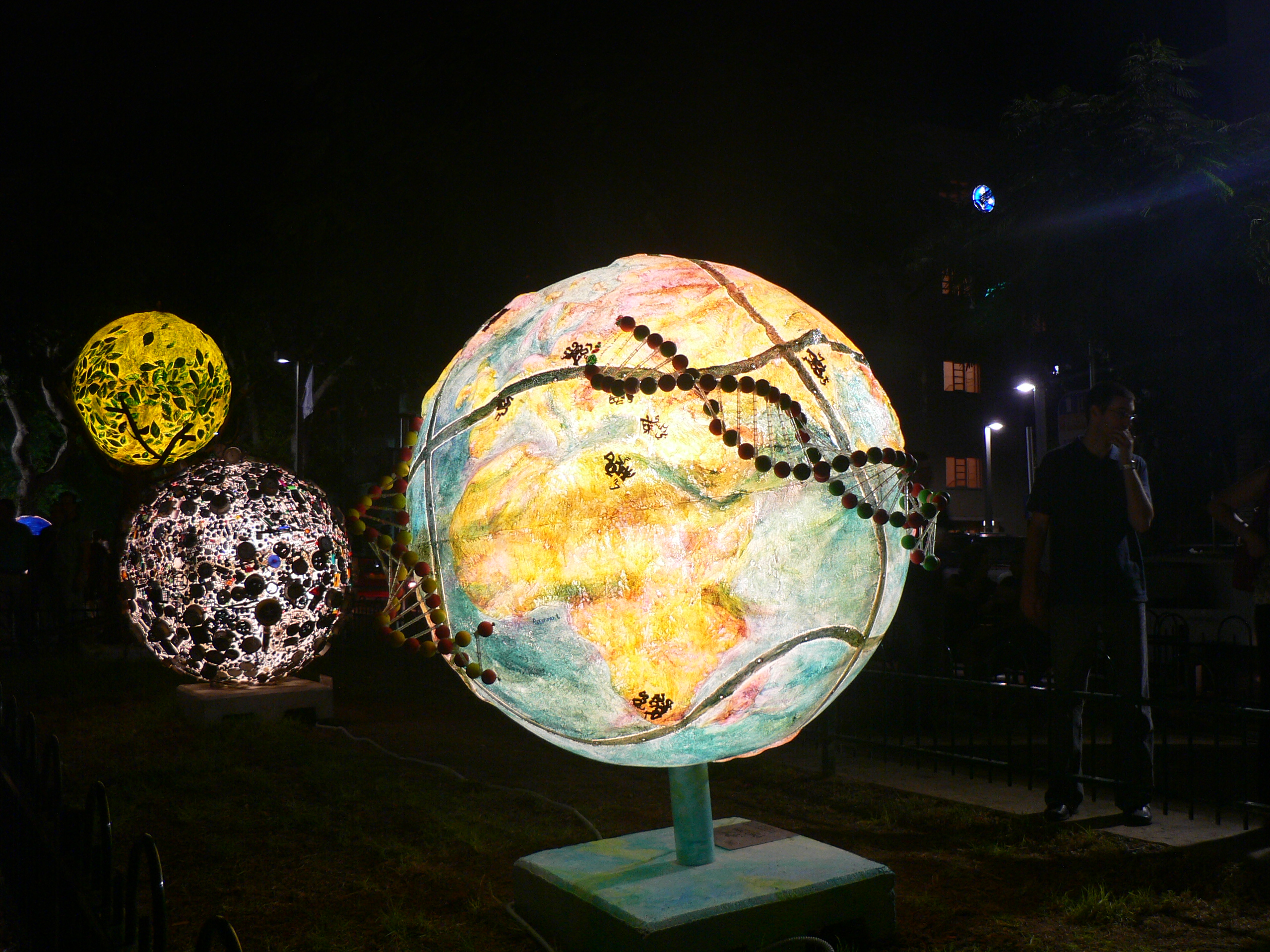 A Gateway to the World: Globes art presentation in Rotschild Boulevards in Tel Aviv during September-October 2007. שער לעולם: מיצג גלובוסים בשדרות רוטשילד בתל אביב, ספטמבר-אוקטובקר 2007